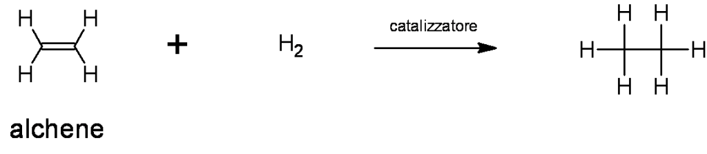 autore: Luigi Capozzi (Campidiomedei) anno: 2006